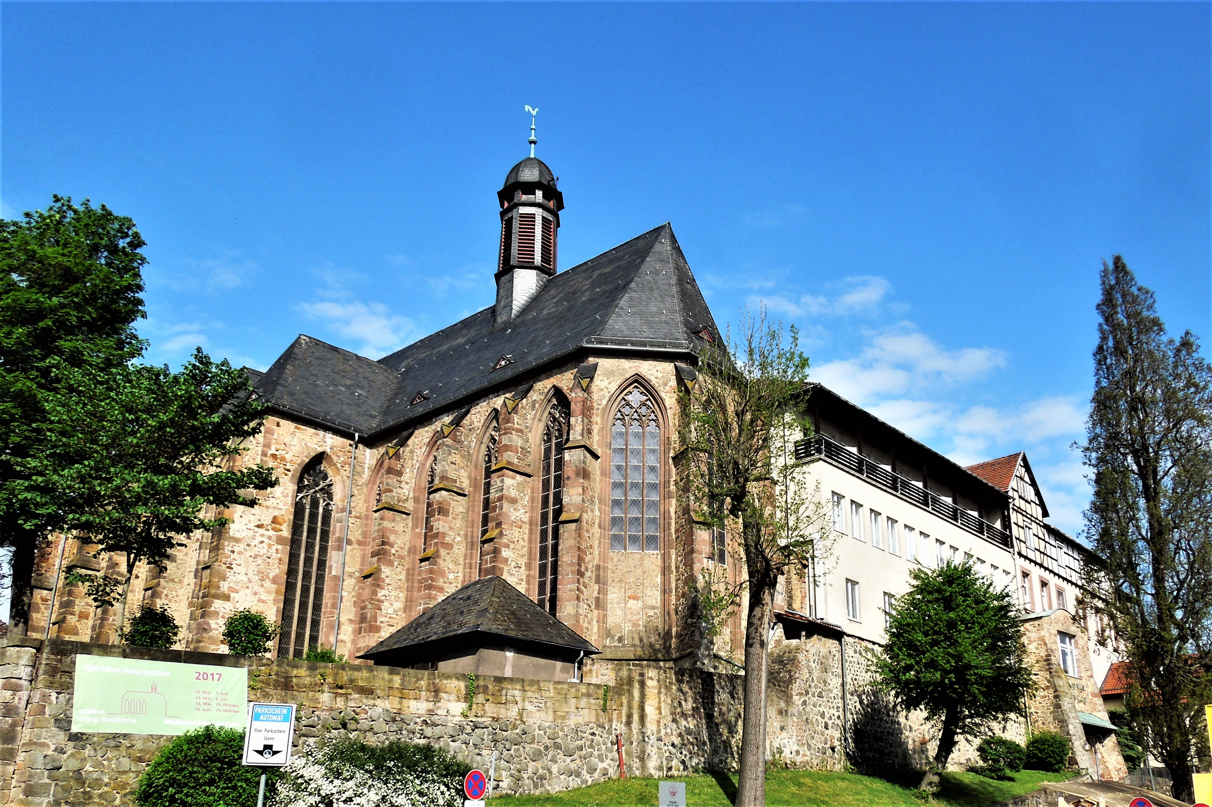 Fritzlar: ev. Stadtkirche und Hospital (rechts, im ehemaligen Minoritenkloster)